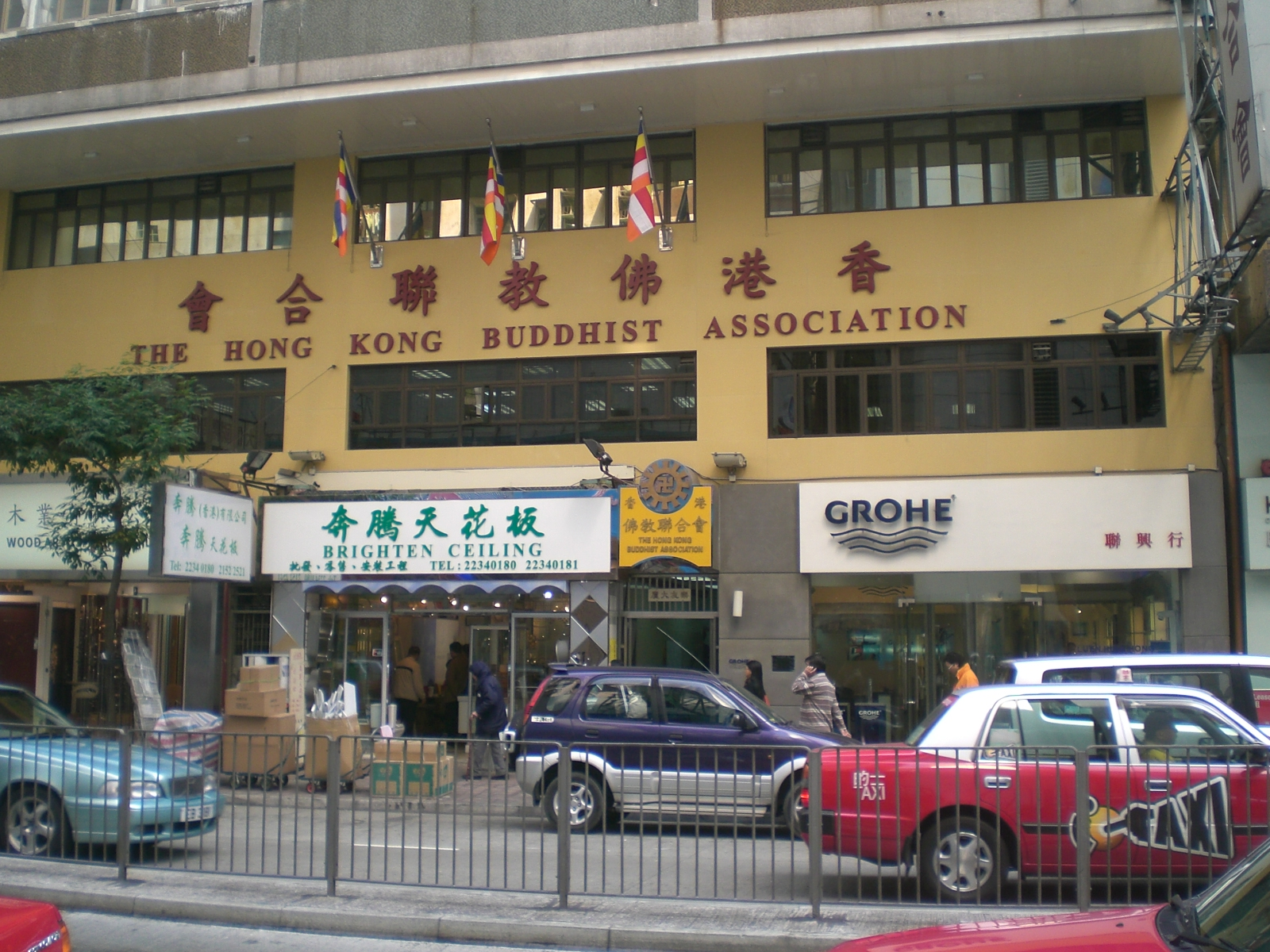 駱克道338號 香港佛教聯合會, Wan Chai, Hong Kong.